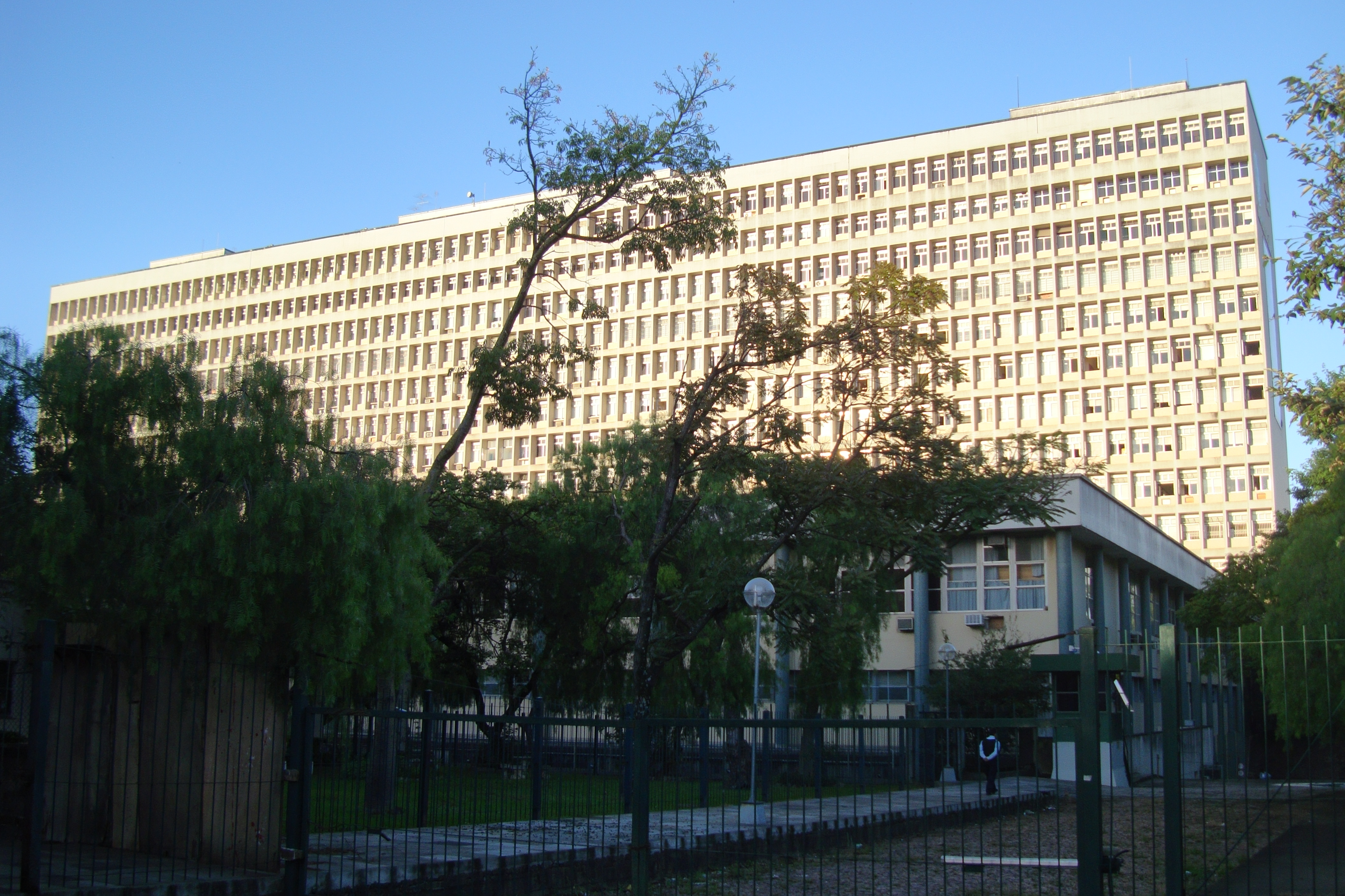 Hospital de Clínicas de Porto Alegre